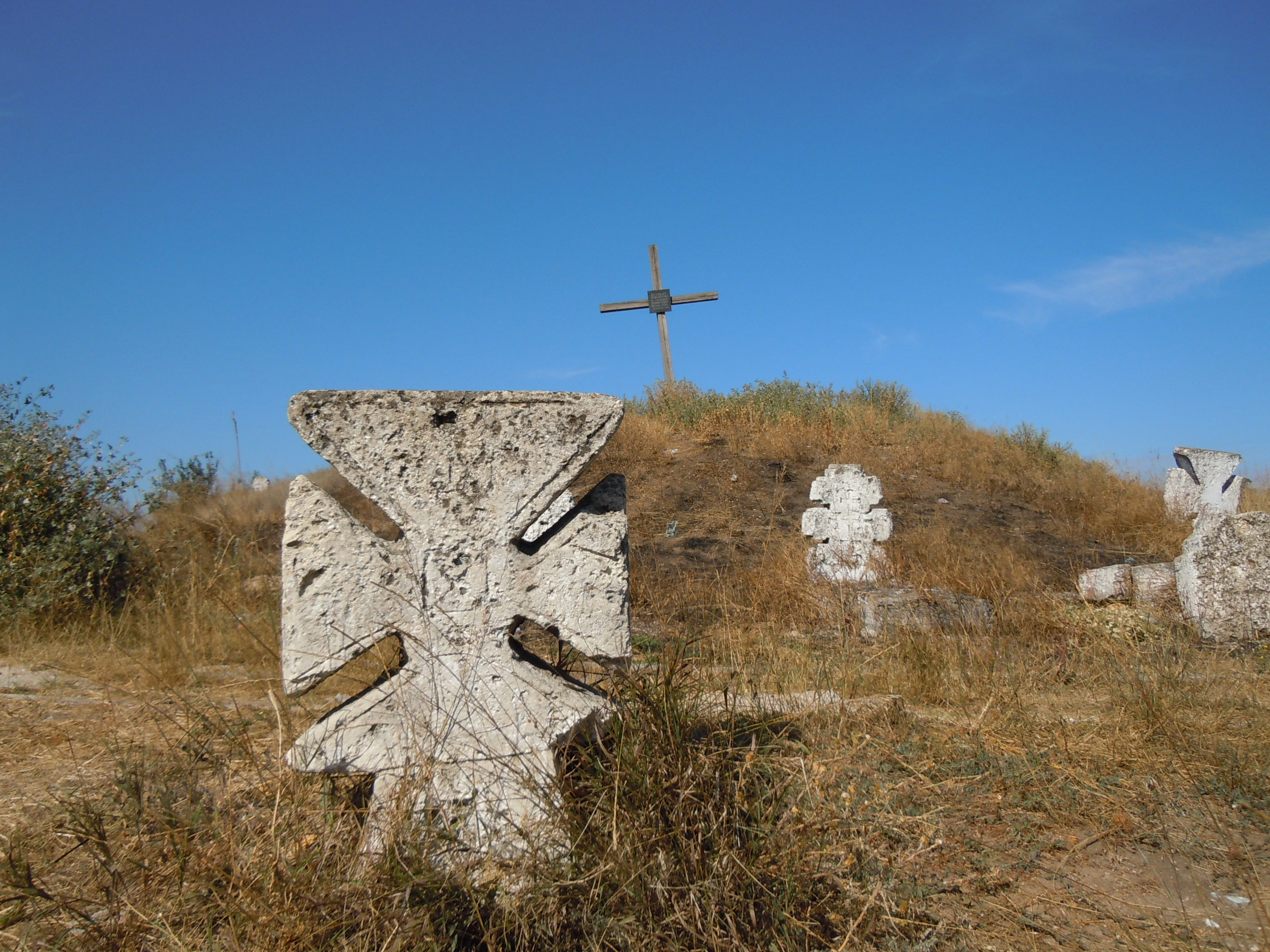 Курган із козацькими могилами на Великому Усатівському цвинтарі